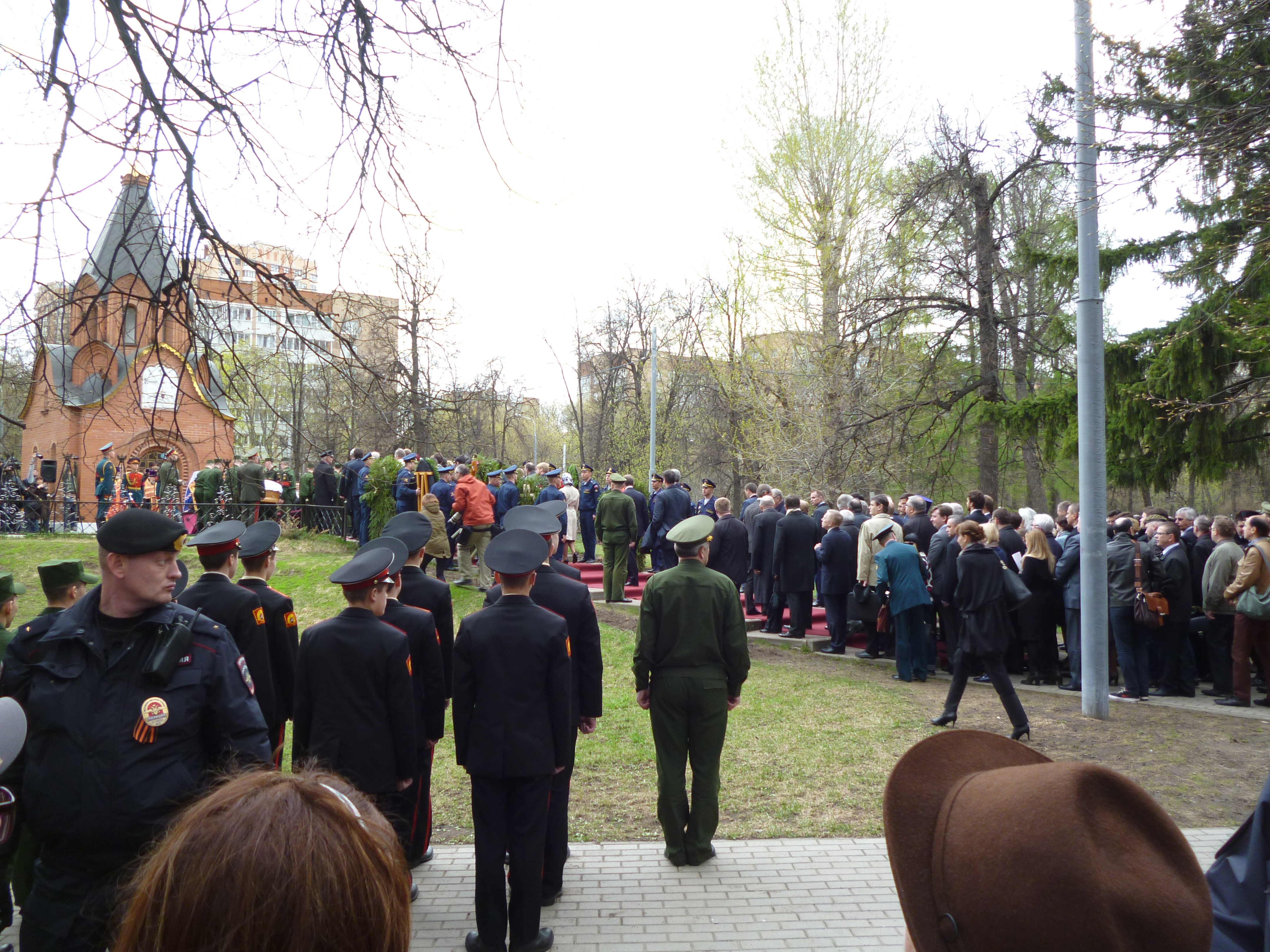 Церемония перезахоронения останков великого князя Николая Николаевича Младшего и его супруги великой княгини Анастасии Николаевны.